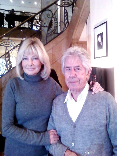 Philippe Gildas et sa femme Maryse au restaurant Drouant (Paris 2e arrond.), à l'occasion du repas spécial Les Restaurants du coeur, le 31 décembre 2010.